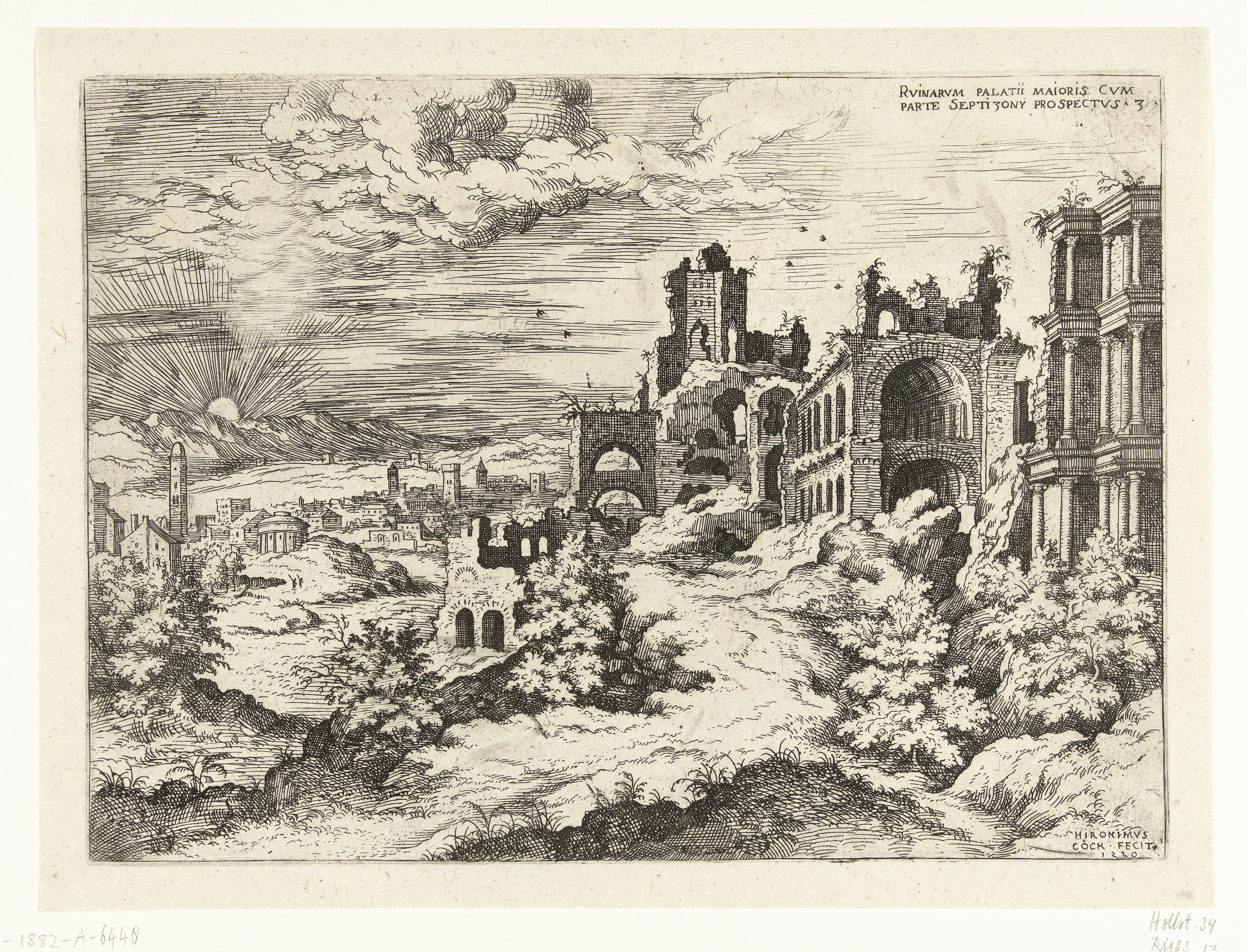 IdentificatieTitel(s): Gezicht op de Palatijn met zonsopgangRvinarvm palatii maioris (...) (titel op object)Romeinse ruïnes (serietitel)Objecttype: prent Objectnummer: RP-P-1882-A-6448Catalogusreferentie: RiggsHollstein DutchOpschriften / Merken: verzamelaarsmerk, verso, gestempeld: Lugt 2228Omschrijving: Gezicht op een deel van de ruïnes op de Palatijn in Rome met links de zonsopgang boven de heuvels. Prent uit een serie van 25 prenten met Romeinse ruïnes.VervaardigingVervaardiger: prentmaker: Hieronymus Cock (vermeld op object)naar eigen ontwerp van: Hieronymus Cockuitgever: Hieronymus CockPlaats vervaardiging: AntwerpenDatering: 1550 en/of 1551Fysieke kenmerken: etsMateriaal: papier Techniek: etsenAfmetingen: plaatrand: h 202 mm × b 276 mmOnderwerpWat: ruin of a building ~ architectureWaar: PalatijnVerwerving en rechtenVerwerving: aankoop nov-1882Copyright: Publiek domein